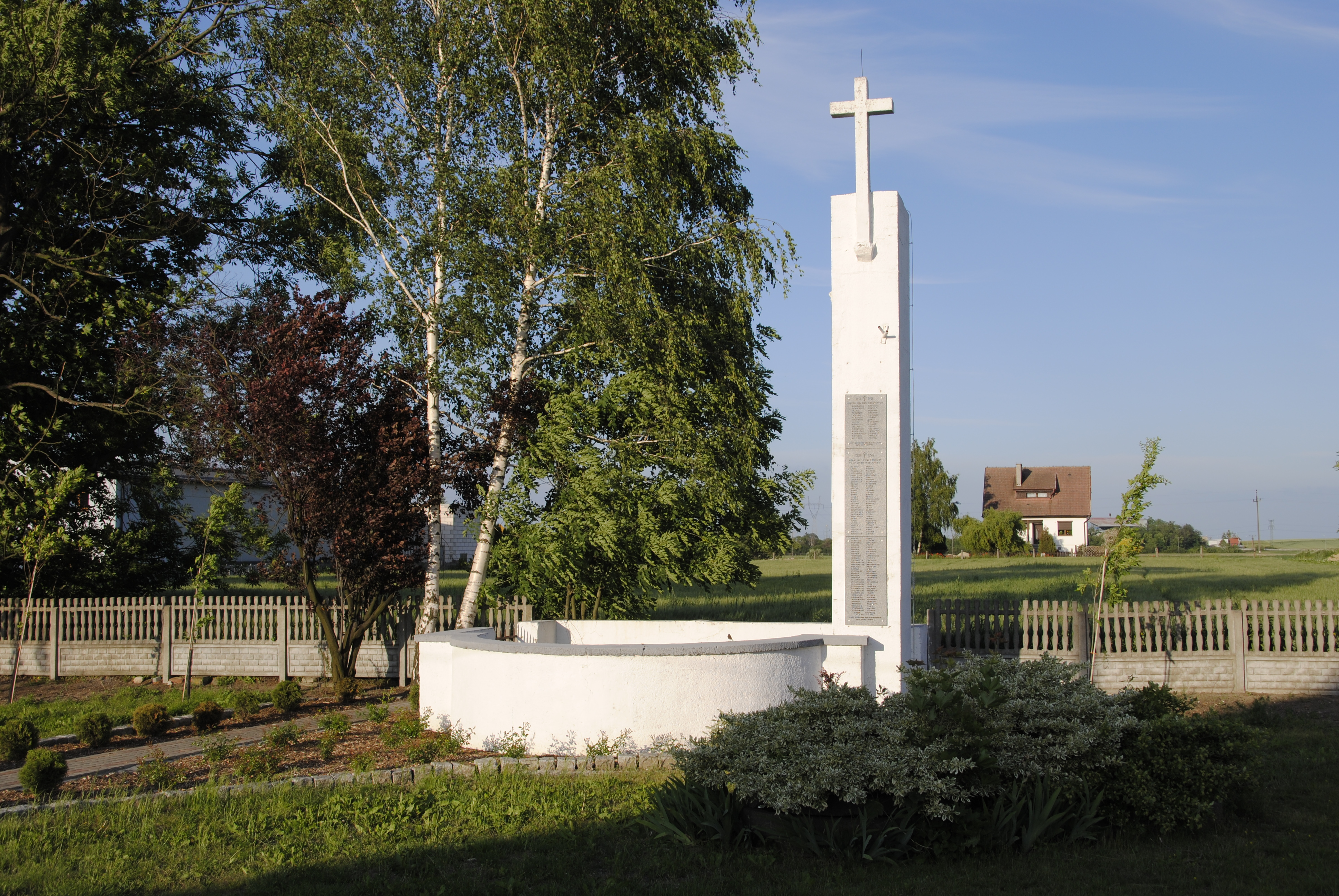 Kriegsdenkmal in Zlattnik für die beiden Weltkriege, Kreis Oppeln